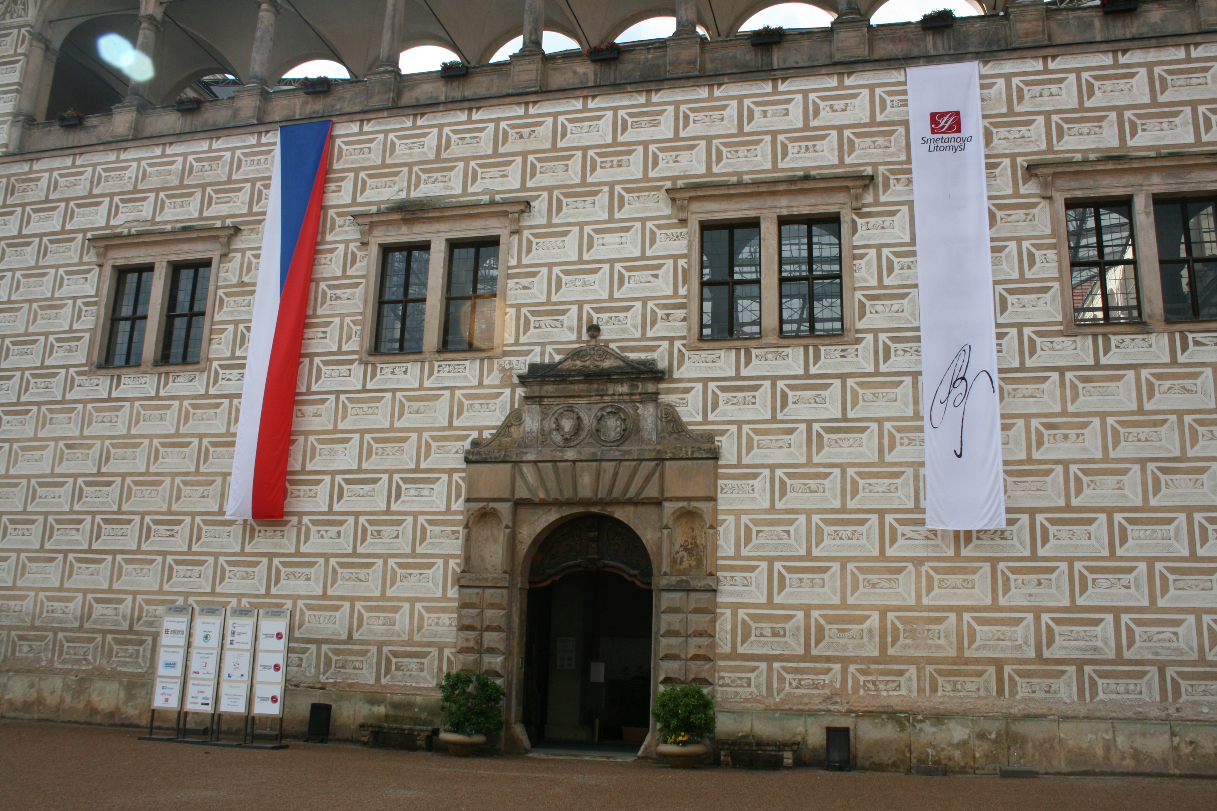 Prapory na čelní fasádě zámku v Litomyšli u příležitosti mezinárodního operního festivalu Smetanova Litomyšl.